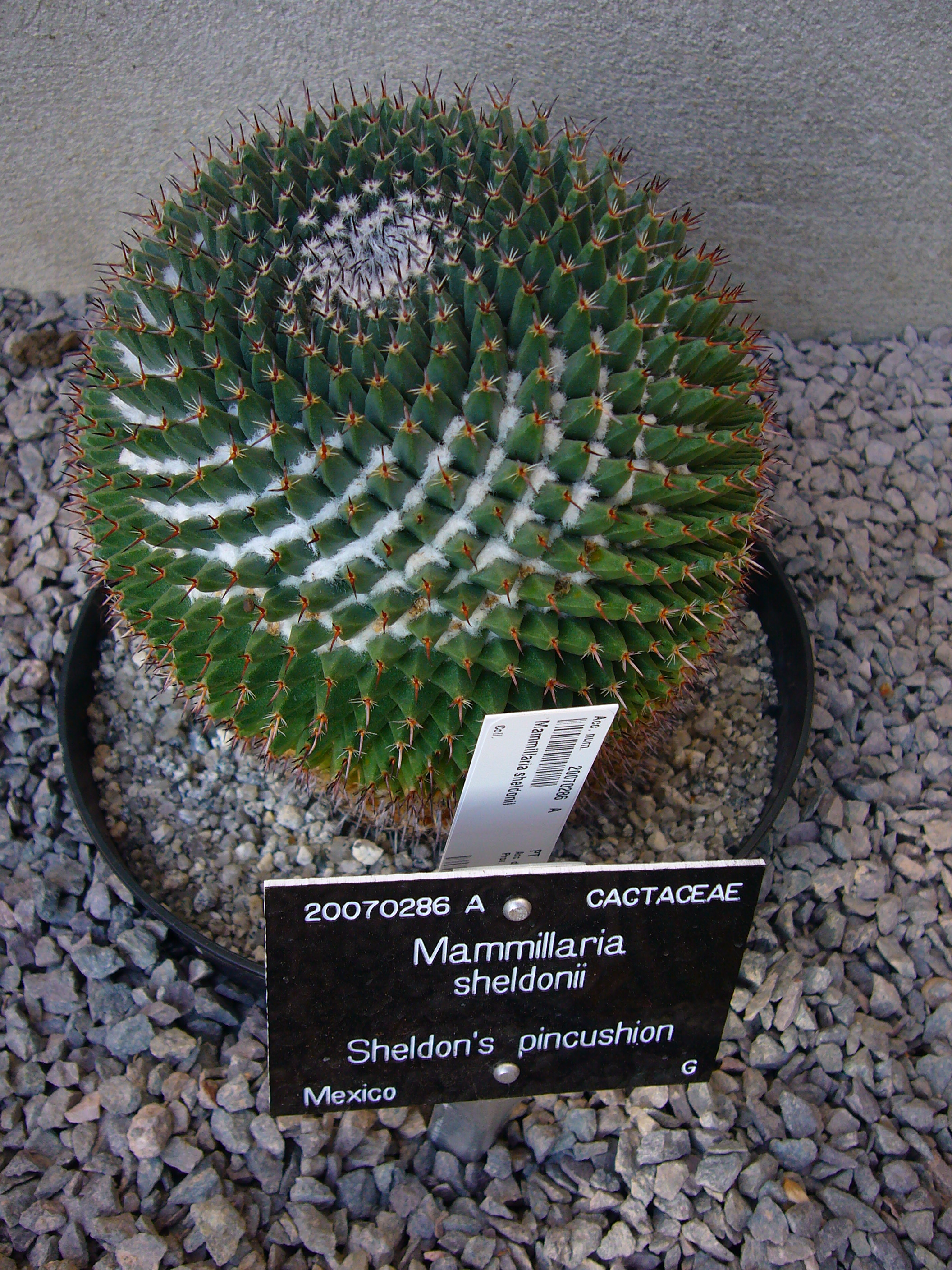 Misidentified Mammillaria, NOT Mammillaria sheldonii